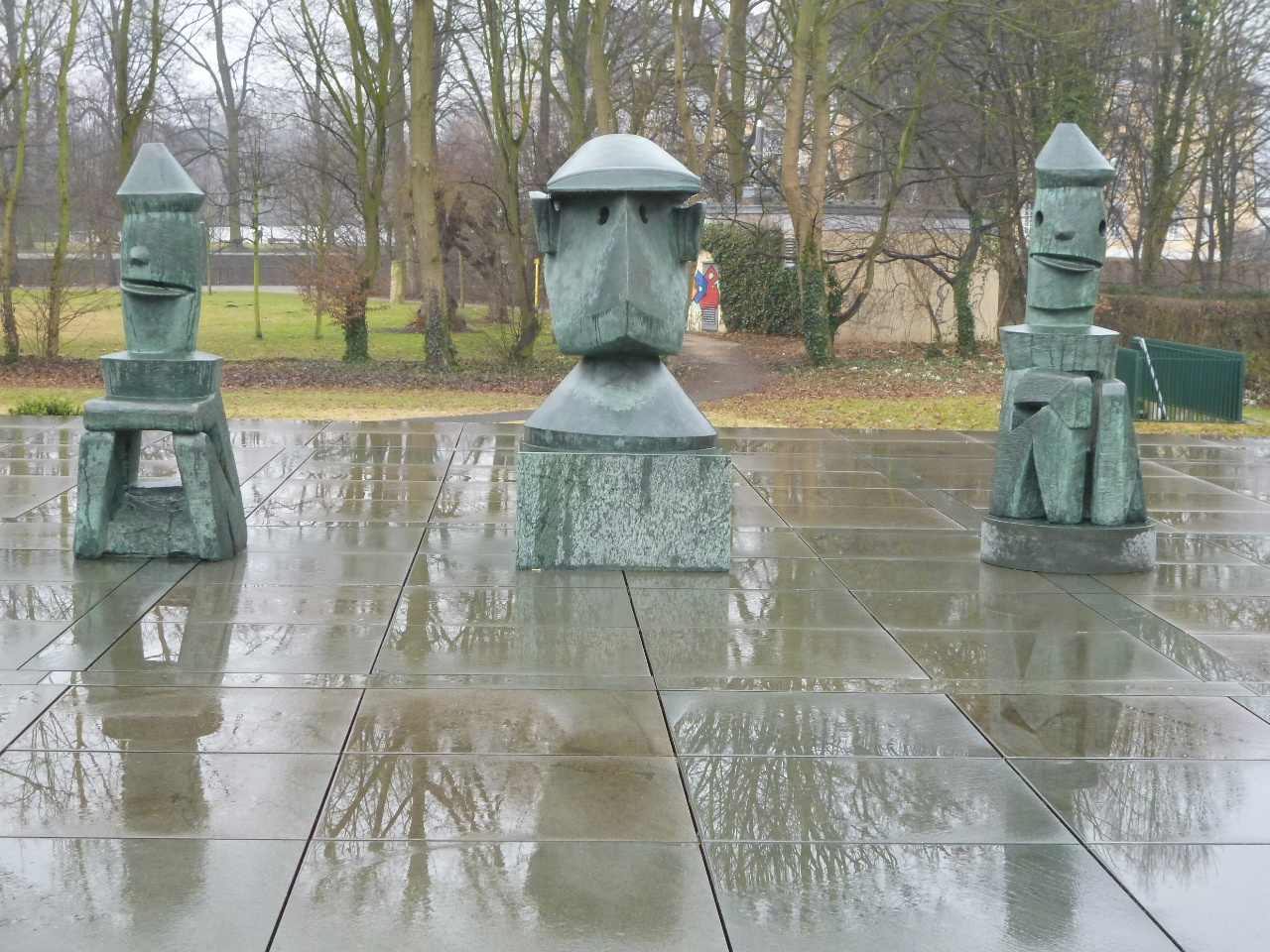 Max Ernst: Corps enseignant pour une école de tueurs (Lehrerkollegium einer Schule für Totschläger) (1967) vor dem Max-Ernst-Museum in Brühl Die beiden Figuren Seraphine Cherub und Seraph der Neuling stehen zu beiden Seiten von Big Brother.